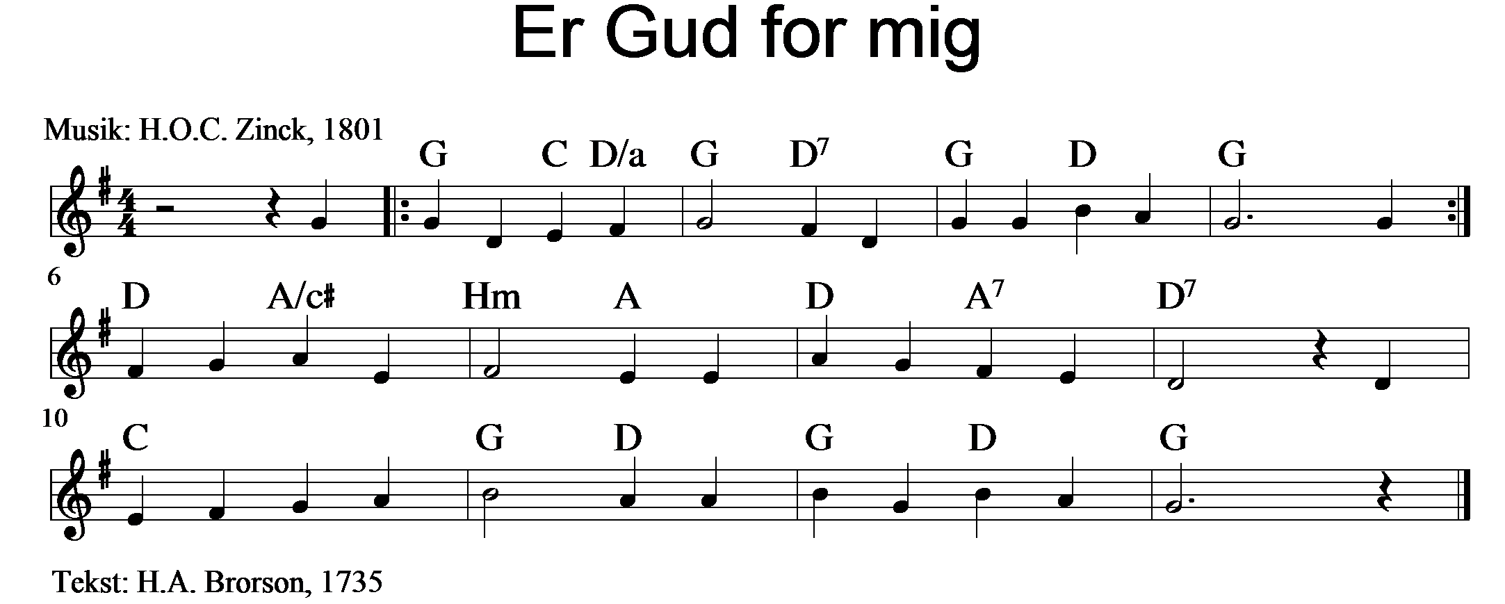 Er Gud for mig.